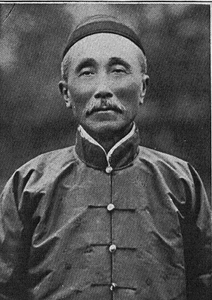 Wu Ting-Fang